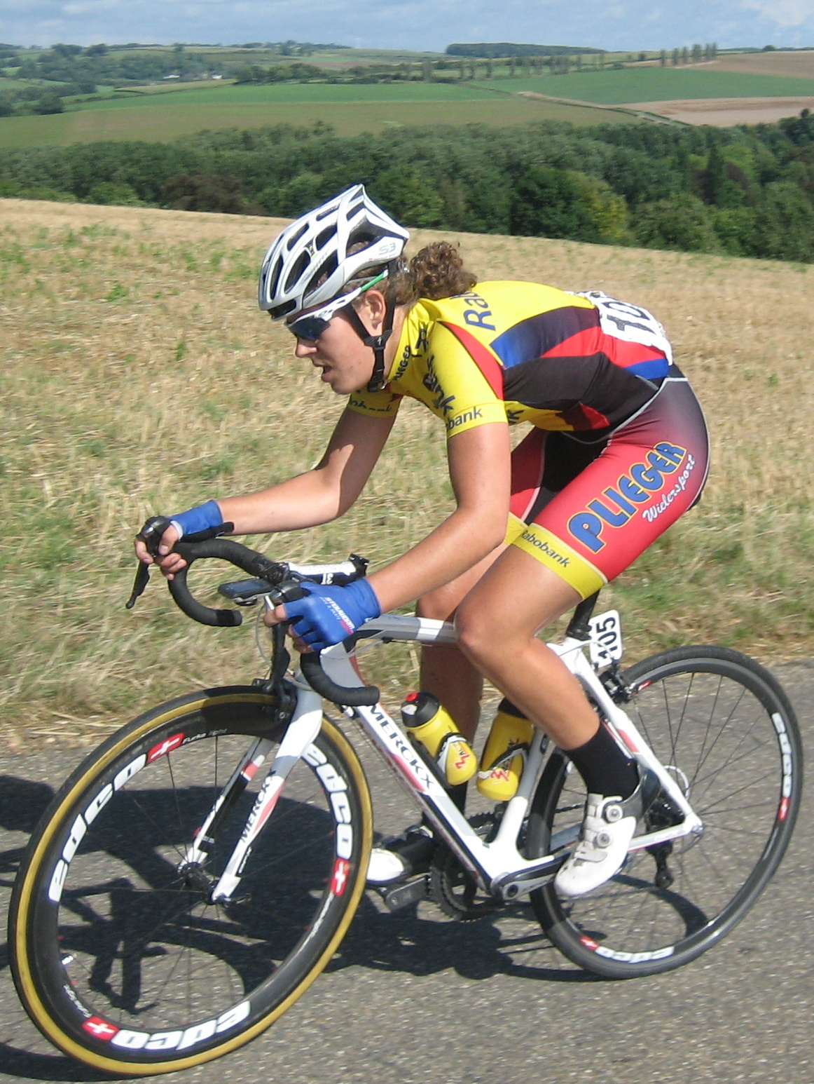 Peloton in de 6e etappe van de Boels Ladies Tour 2016 op de Gulpenerberg in Limburg.